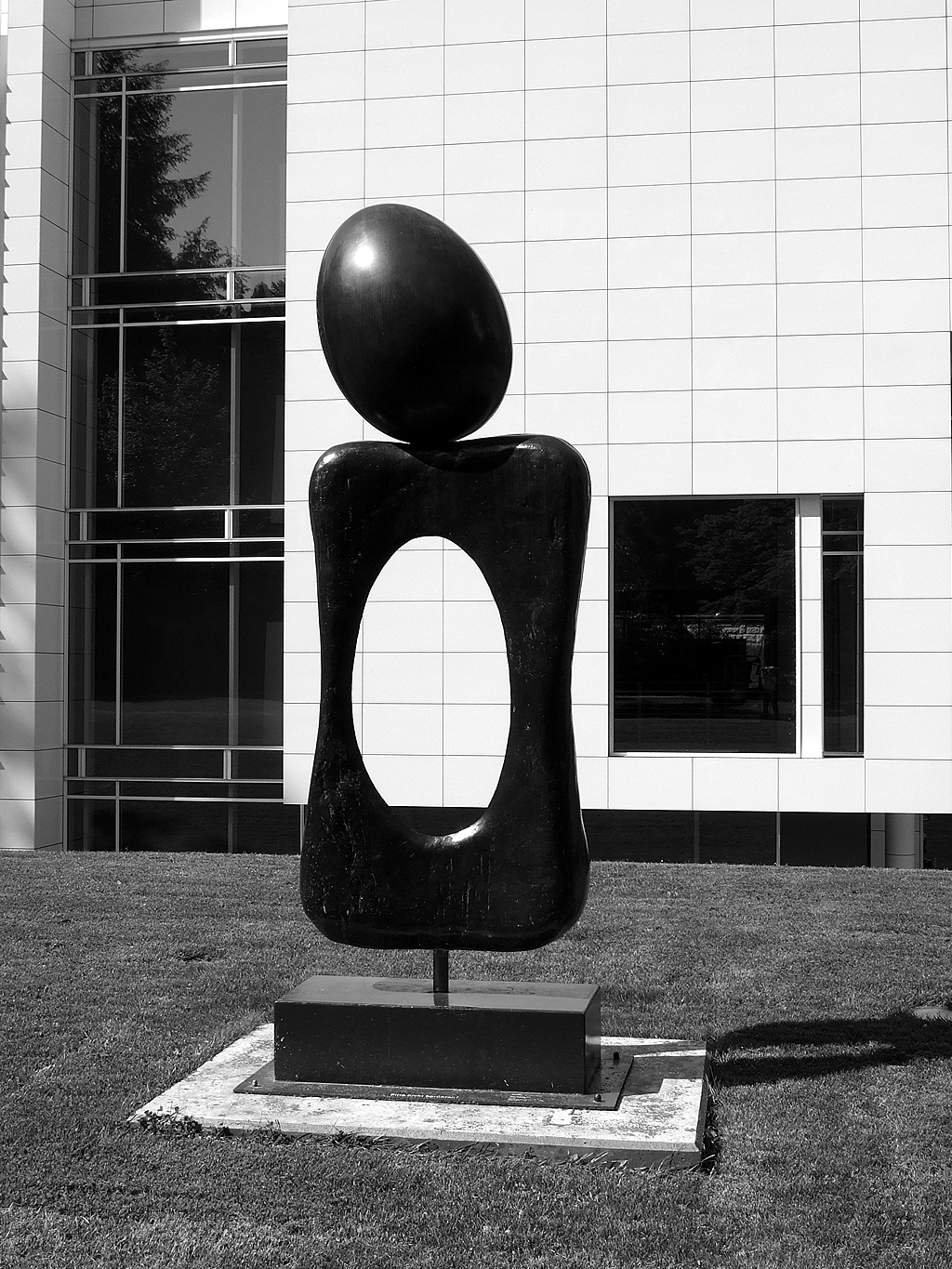 Kunstmuseum